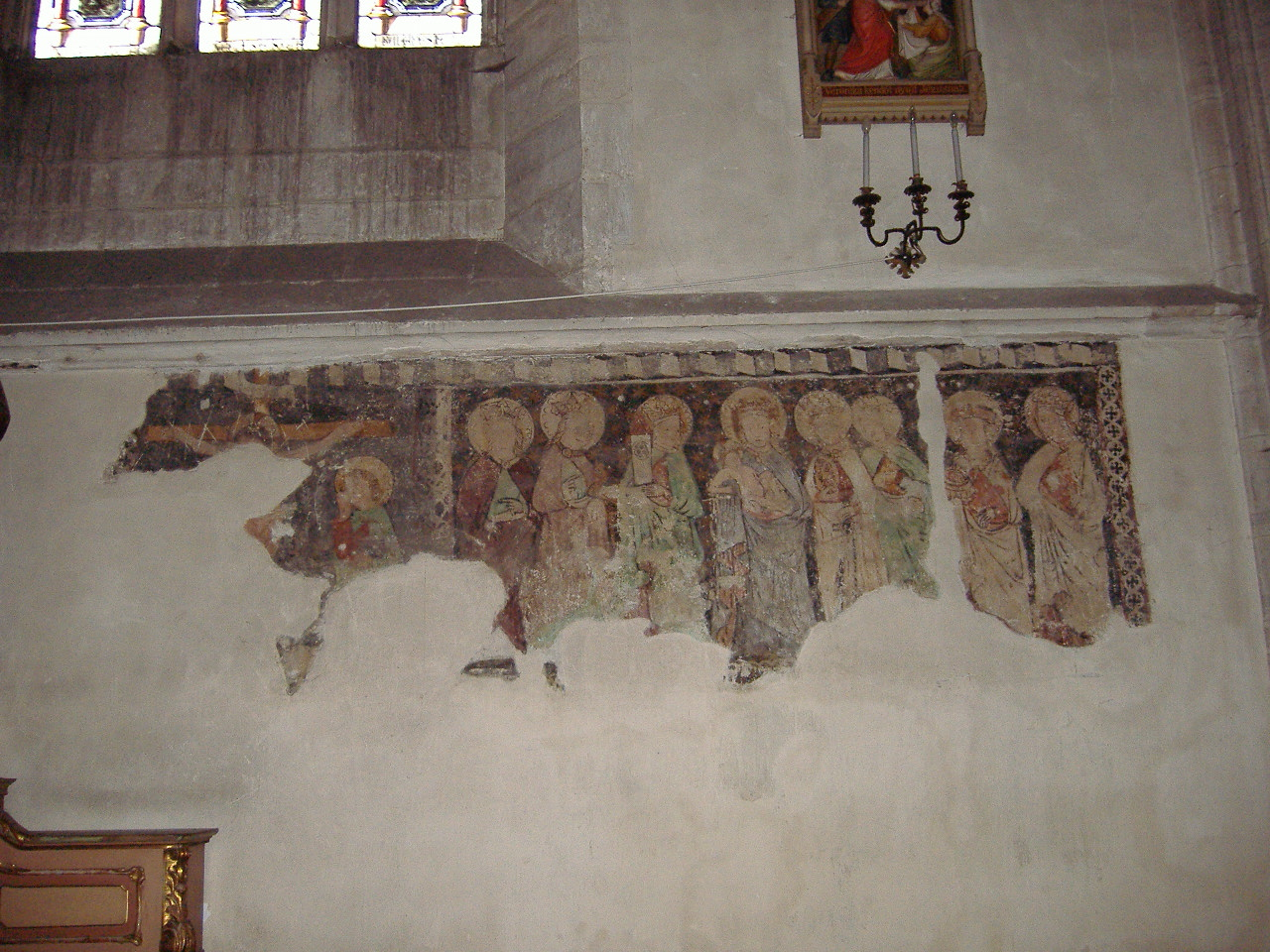 Freskó a kolozsvári Szent_Mihály-templomban